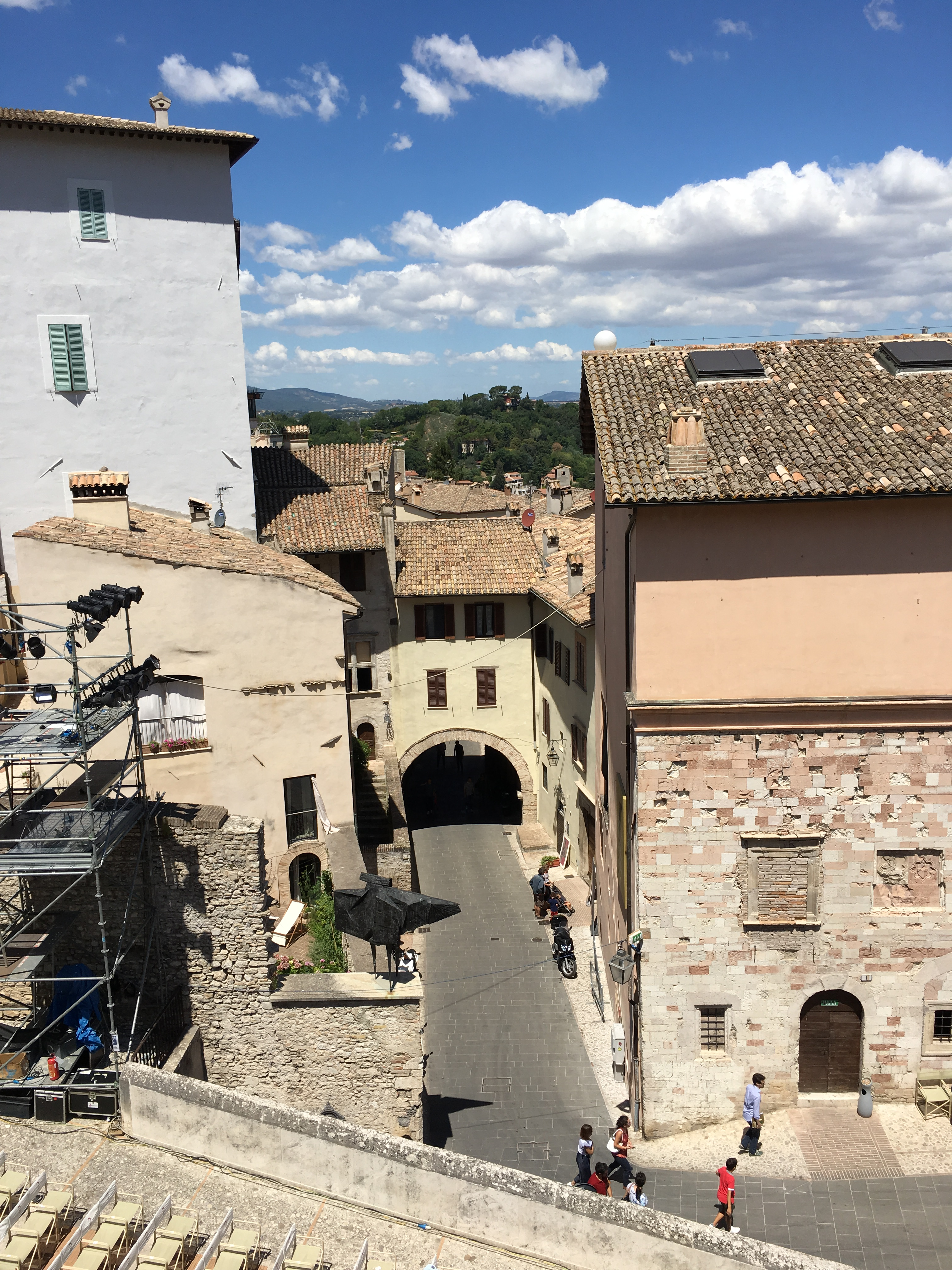 Spoleto, via del Duomo